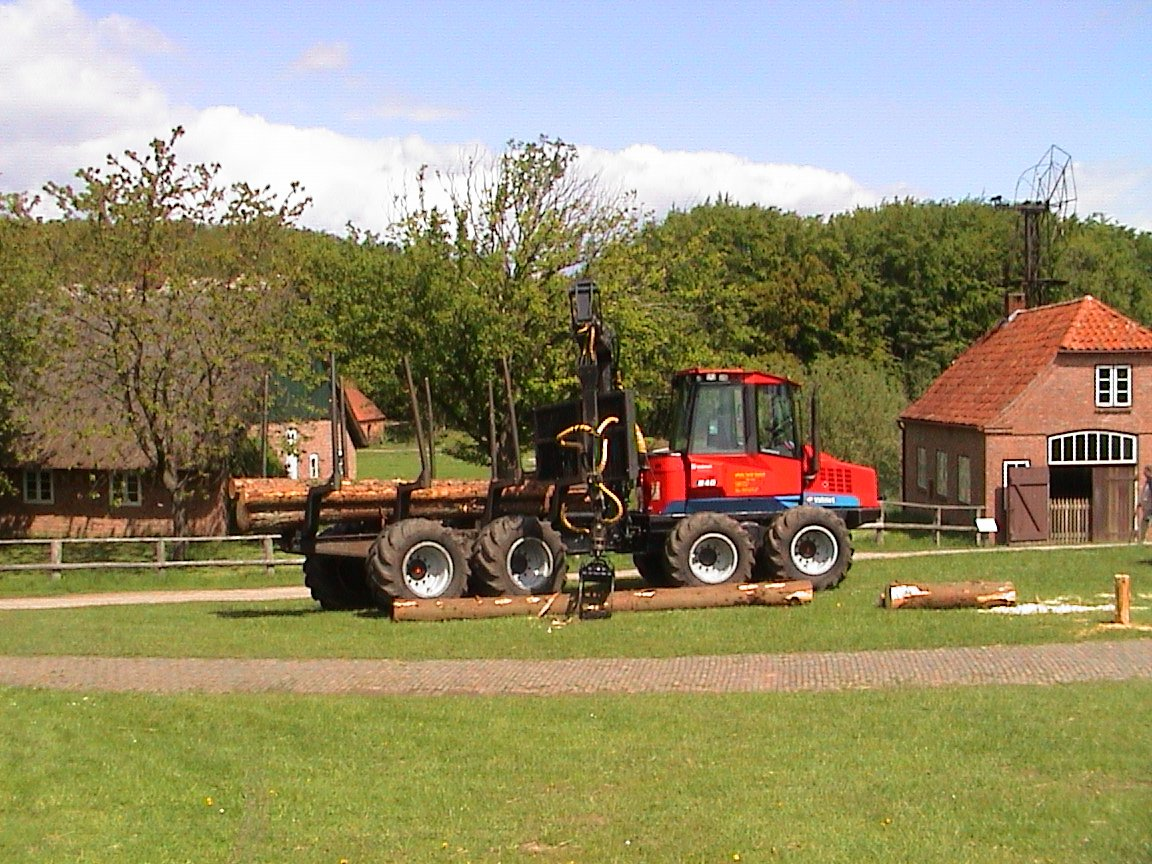 Forstlicher Rückezug, Forwarder, Tragrück(e)schlepper von Valmet